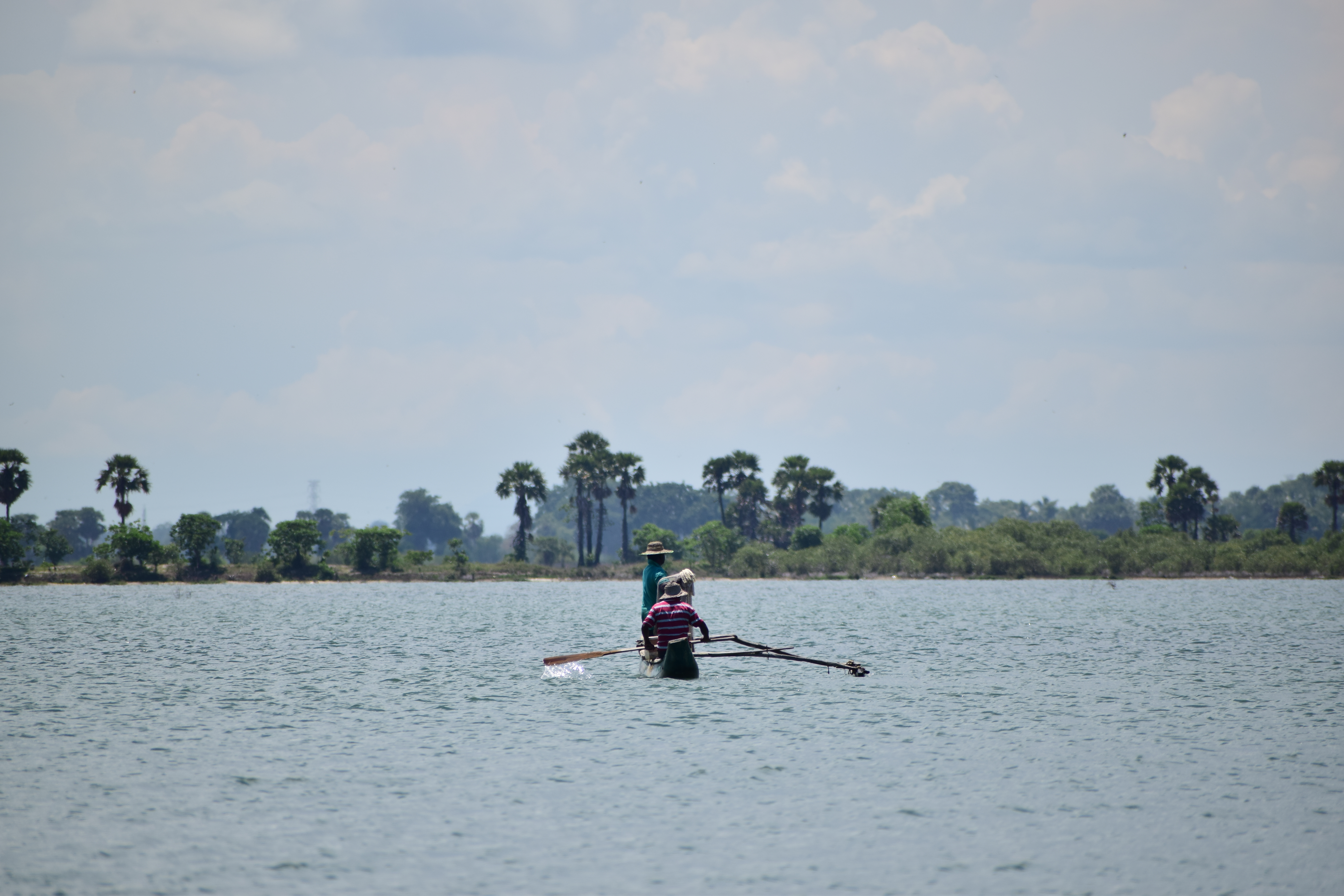 எருமைத்தீவு சுற்றுப்புறம்